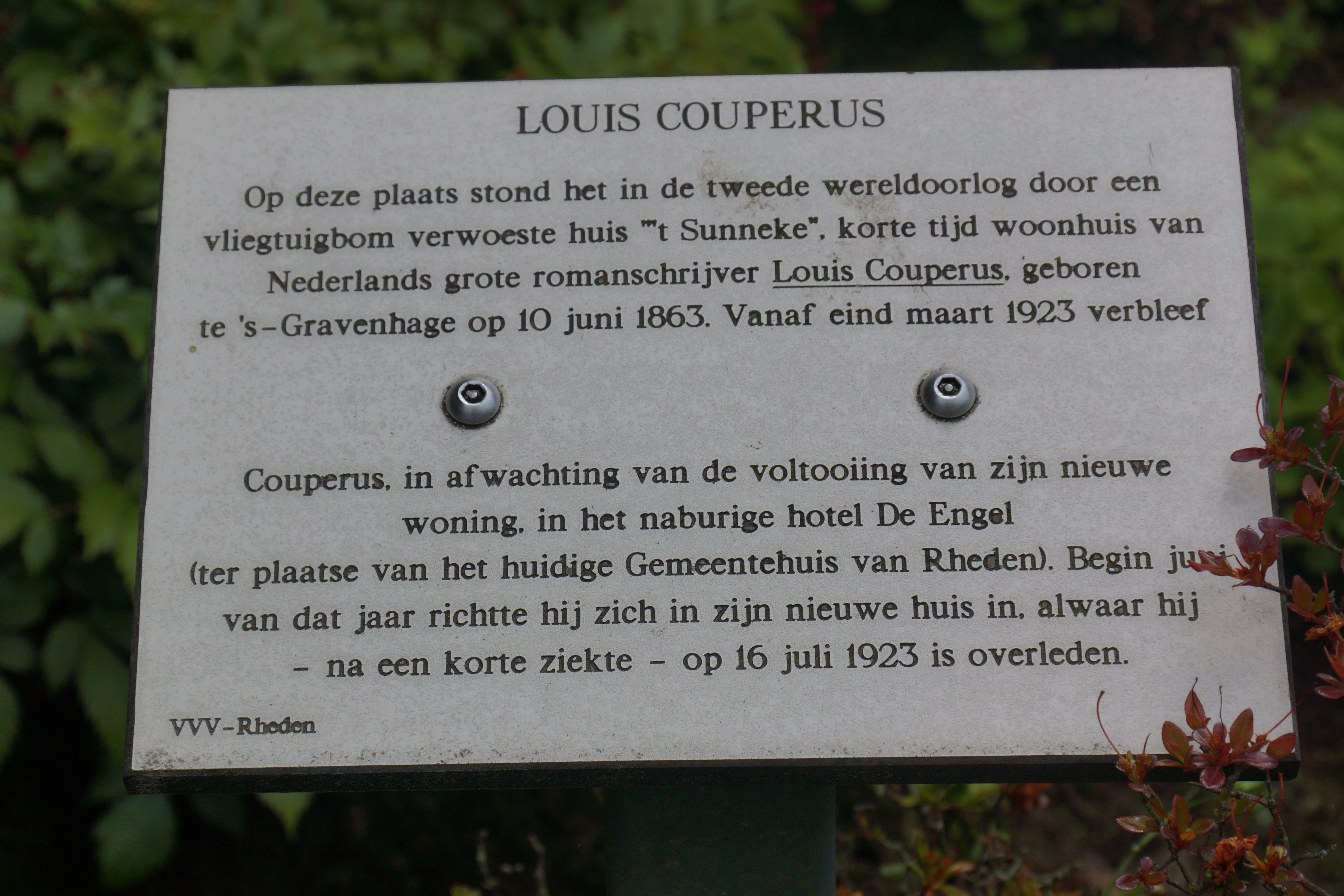 De Steeg Couperus 150624 (2)